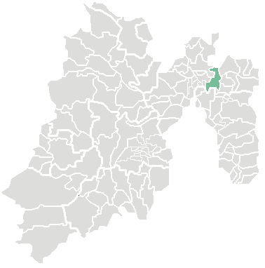 Imagen de la ubicación del municipio de Tecámac, Estado de México